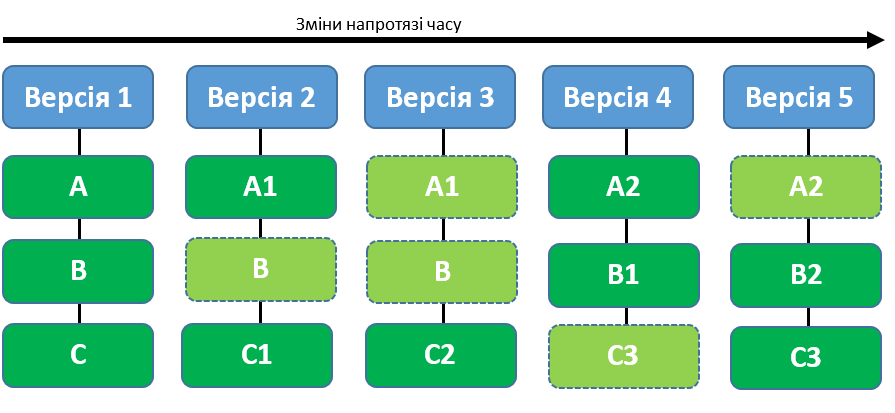 Git image filesystem